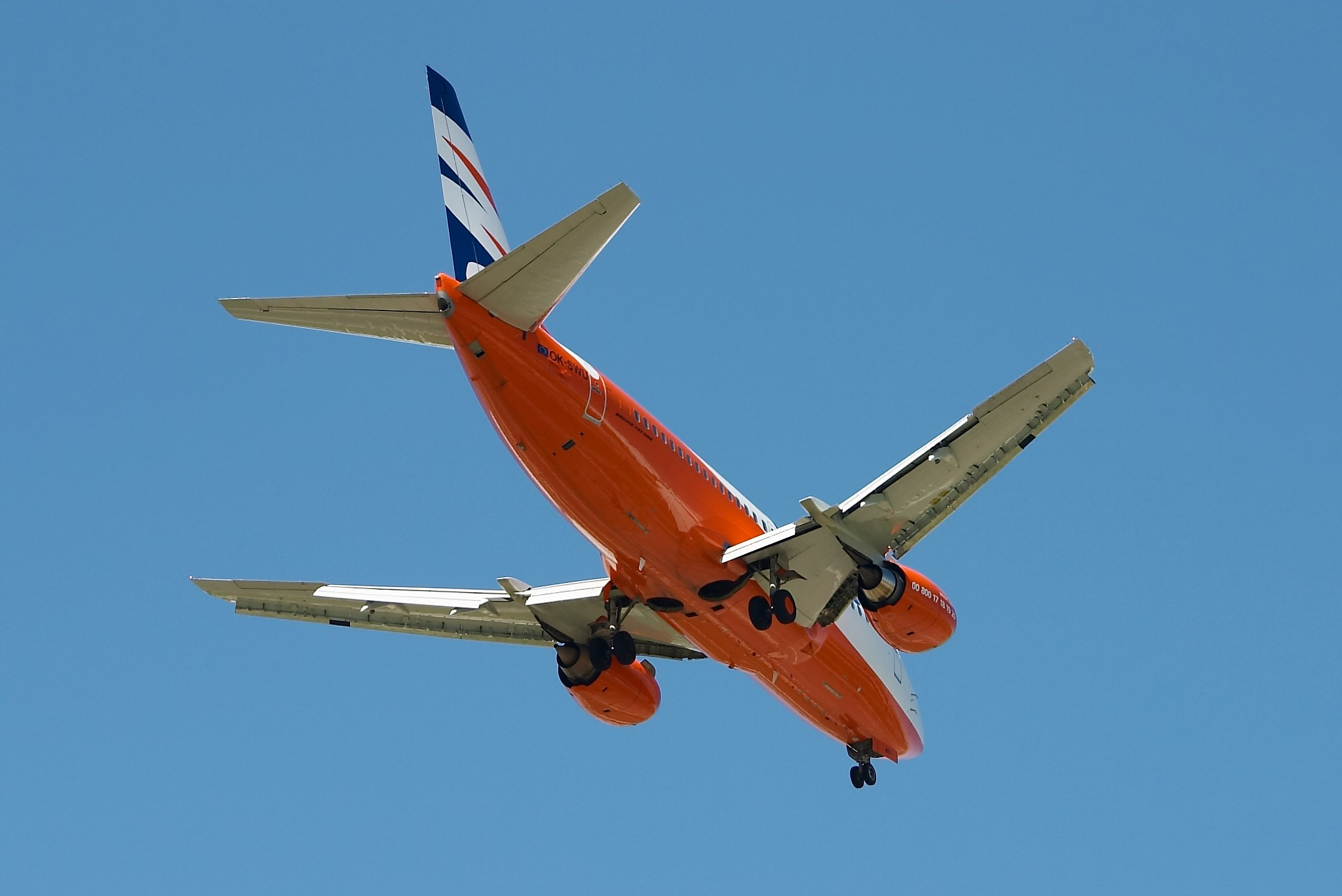 Boeing 737-522 de Smart Wings. Aeropuerto de Madrid Barajas.